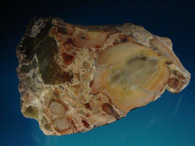 marmur serpentynowo - brucytowy;autor zdjęcia Piotr Gut